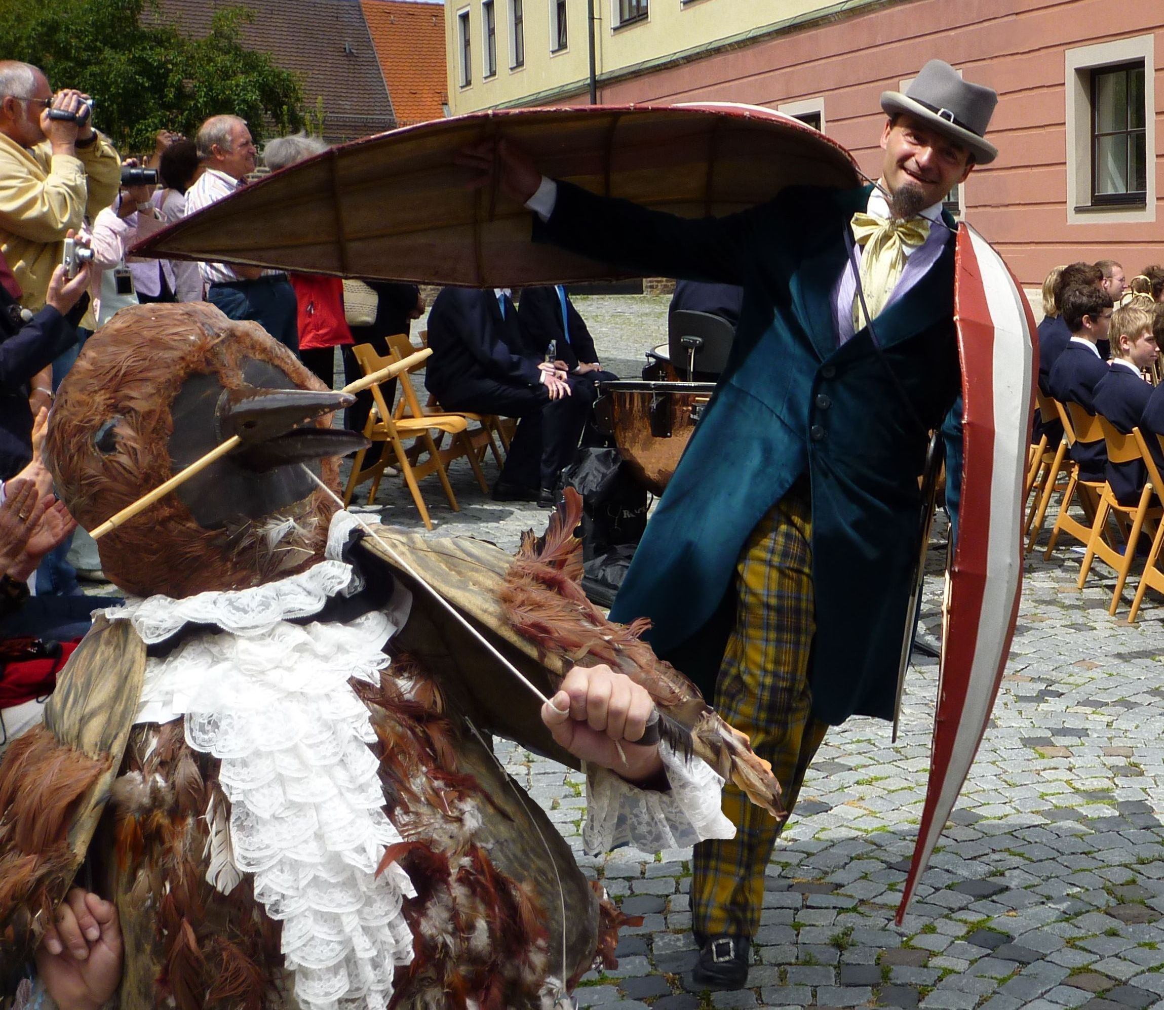 Ulm - Ulmer Spatz und Schneider (Fotomontage aus 2 eigenen Fotos)